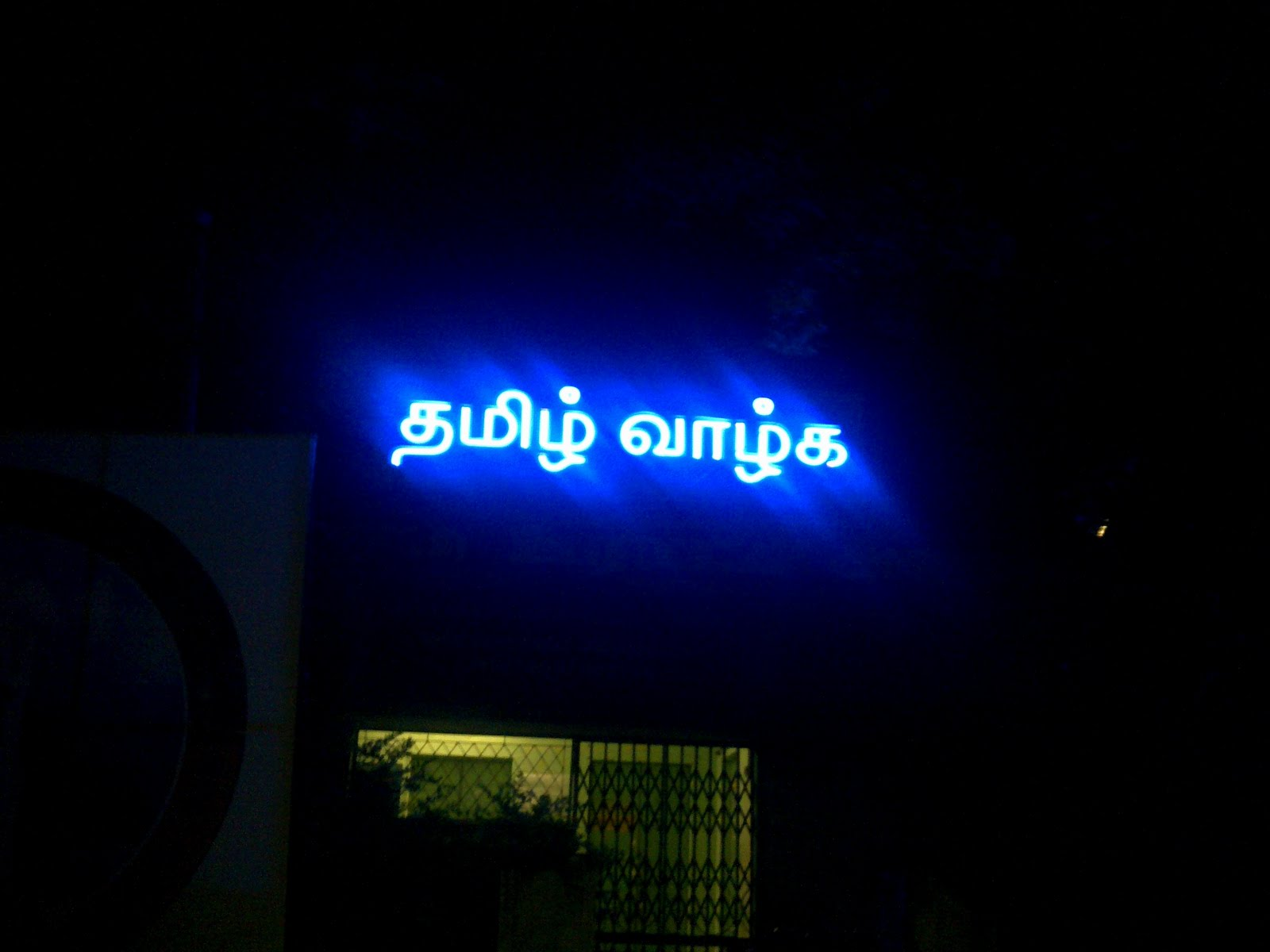 Tamilnadu government will be announced tamil vallka light board